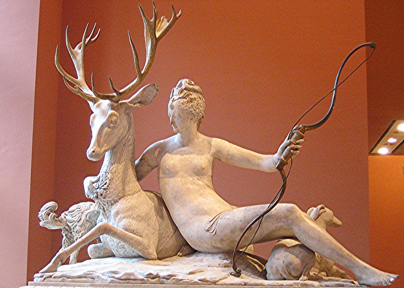 statue de Diane chasseresse, XVIe siècle, musée du Louvre / photo personnelle de l'utilisateur Urban, décembre 2004 Urban, 2004